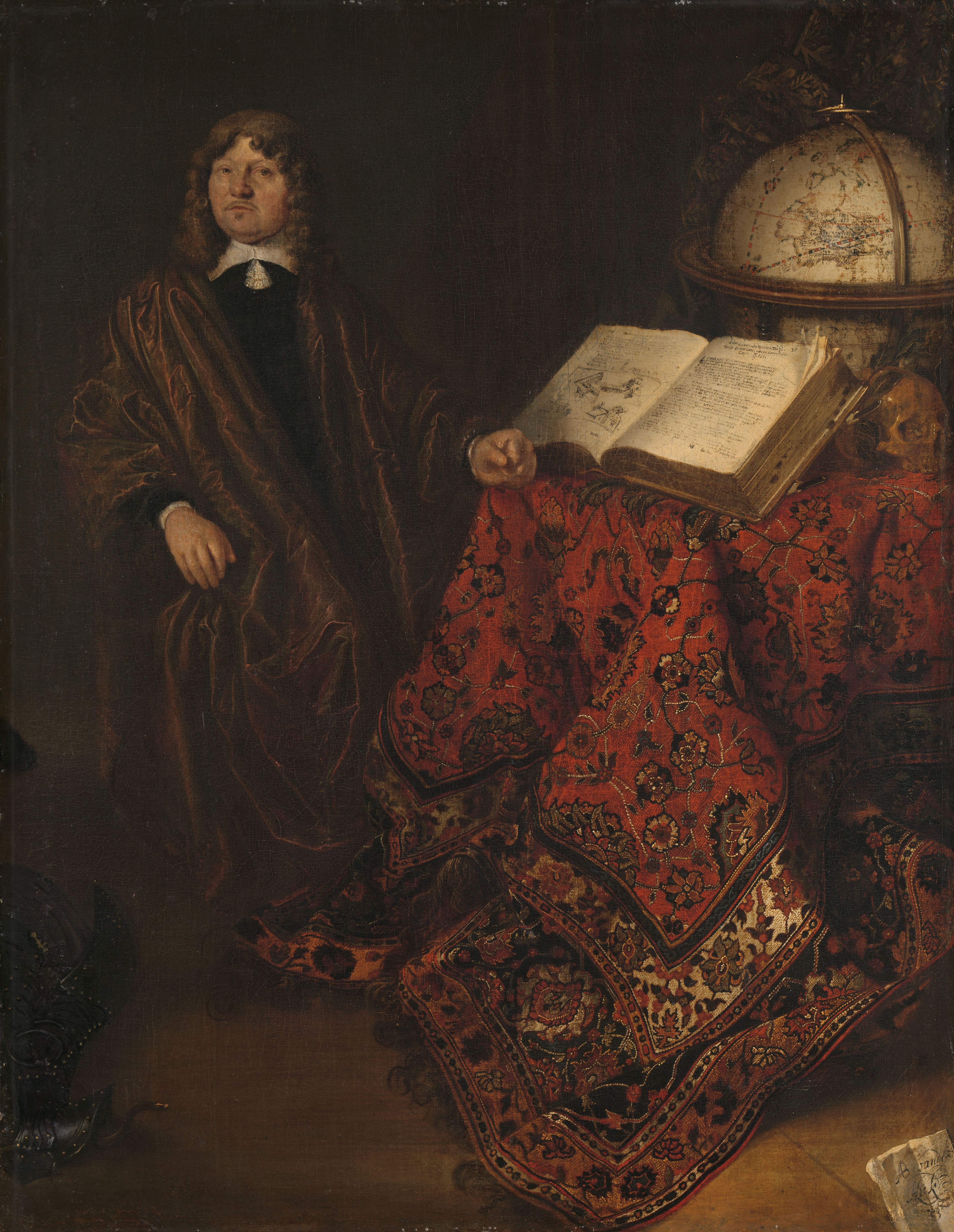 Portret van Cornelis Jansz Meyer, waterbouwkundige. Zittend, ten voeten uit, in een stoel bij een tafel waarover een groot Perzisch kleed is gedrapeerd. Op tafel staan een opengeslagen boek en een aardglobe.